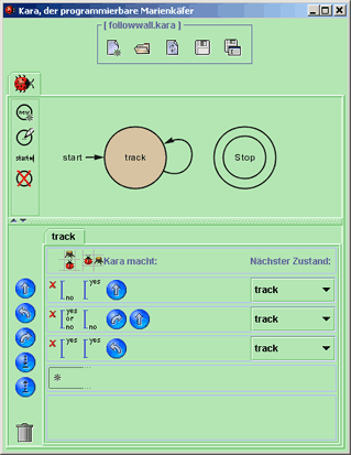 Kara Programmeditor in Benutzung.